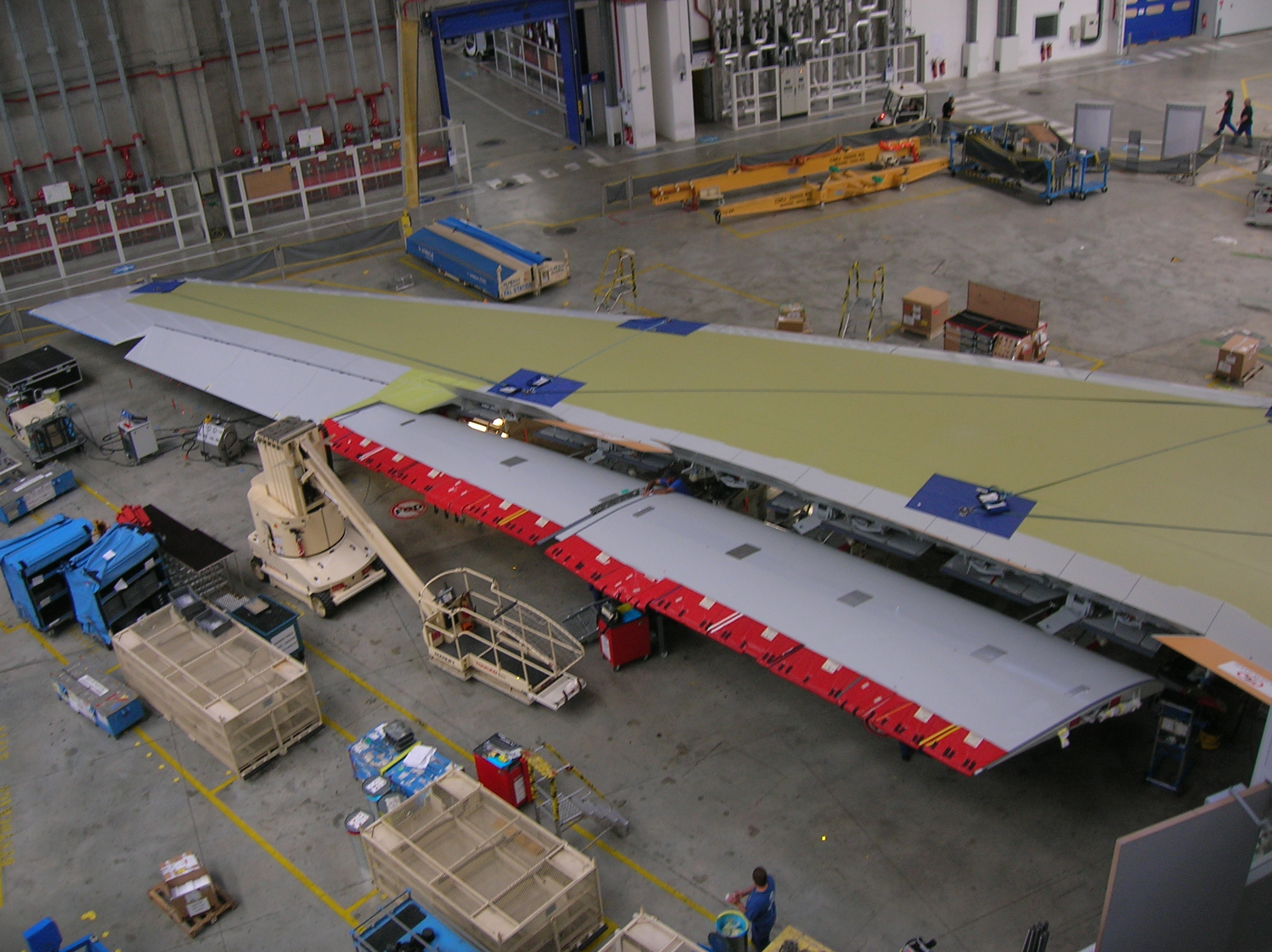 Airbus Lagardère P45 -Wing equipping (MSN120)